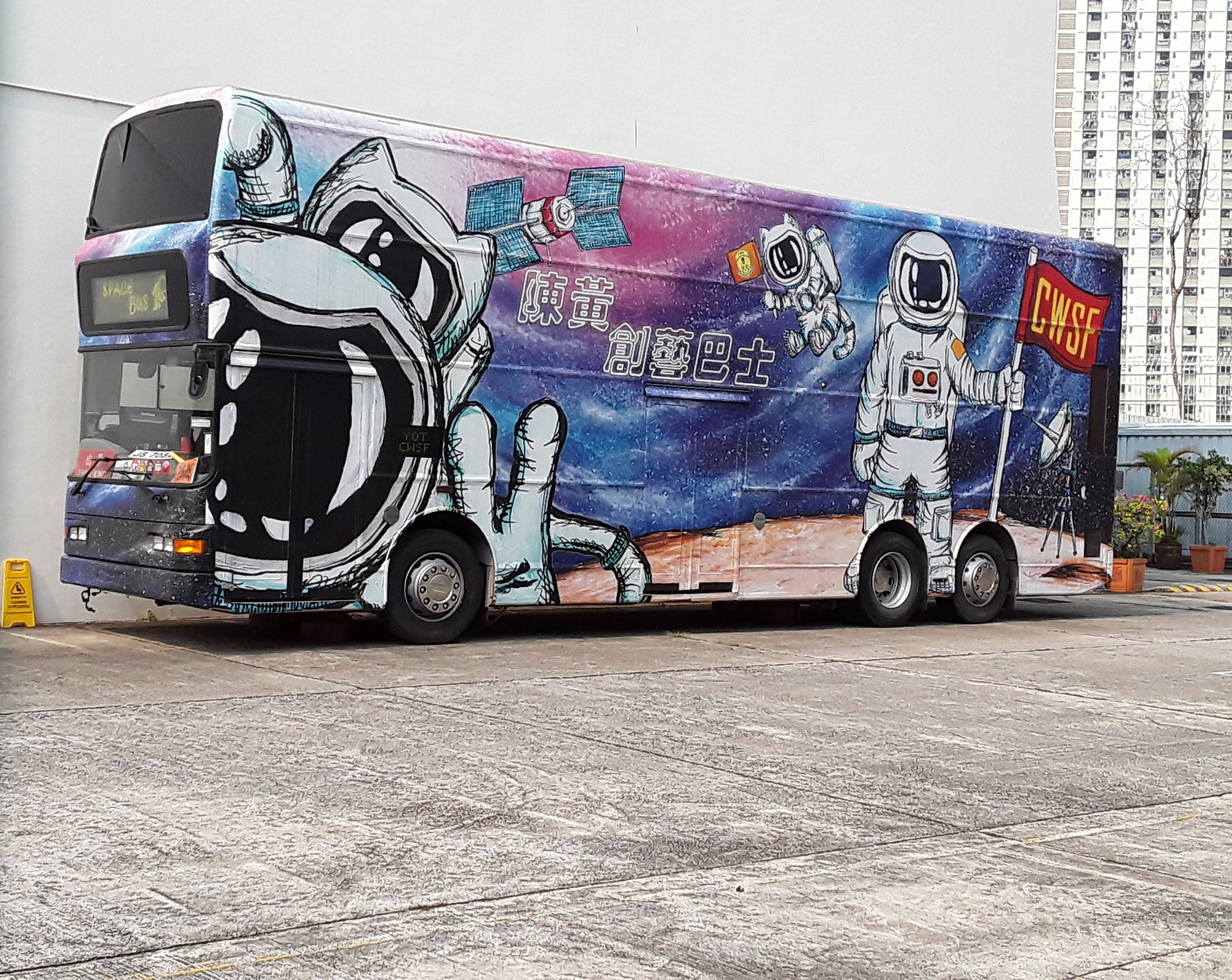 校舍內的創藝巴士